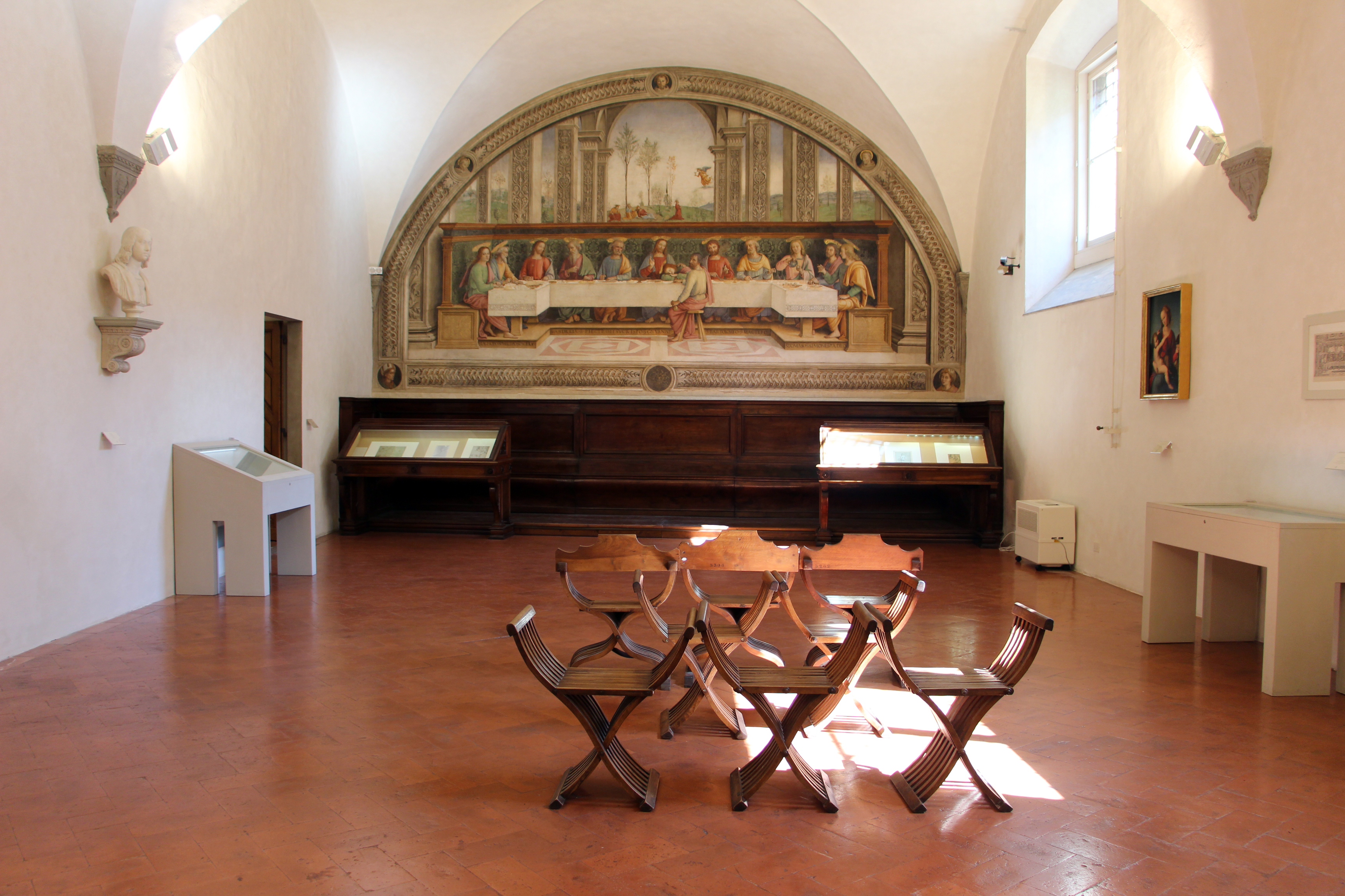 Cenacolo di Fuligno - MIBAC The making of this document was supported by Wikimedia CH. (Submit your project!) For all the files concerned, please see the category Supported by Wikimedia CH. This is a photo of a monument which is part of cultural heritage of Italy.